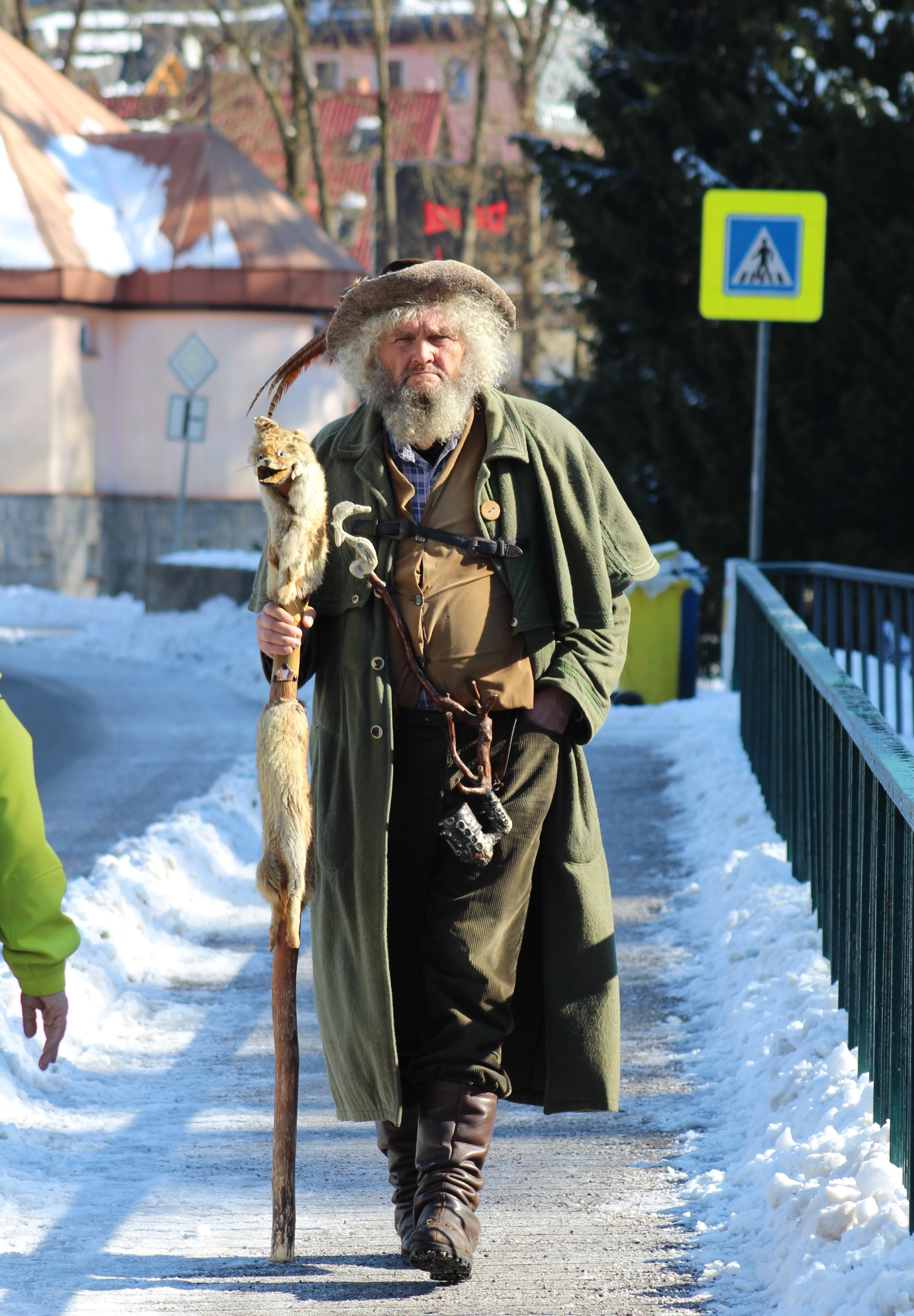 Špindlerův Mlýn, Krakonoš na mostě